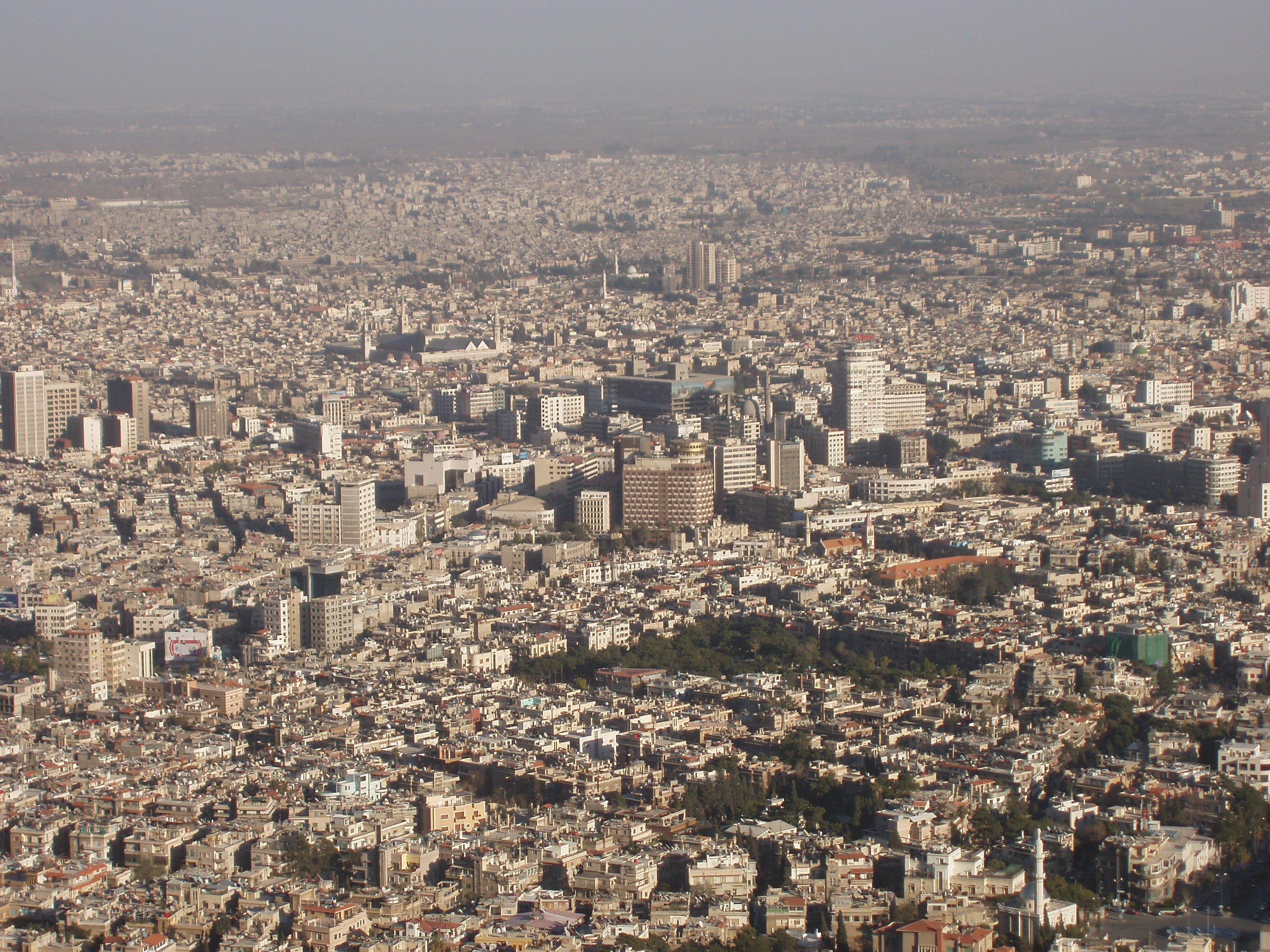 Blick von der Höhe im Norden auf die Capitale Syriens. Im oberen linken Bildviertel ist die Umayyaden-Moschee mit ihren drei Minaretten (gerade noch) zu erkennen